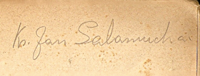 Autograf pochodzi z książki, która należała do ks. Jana Salamucha.